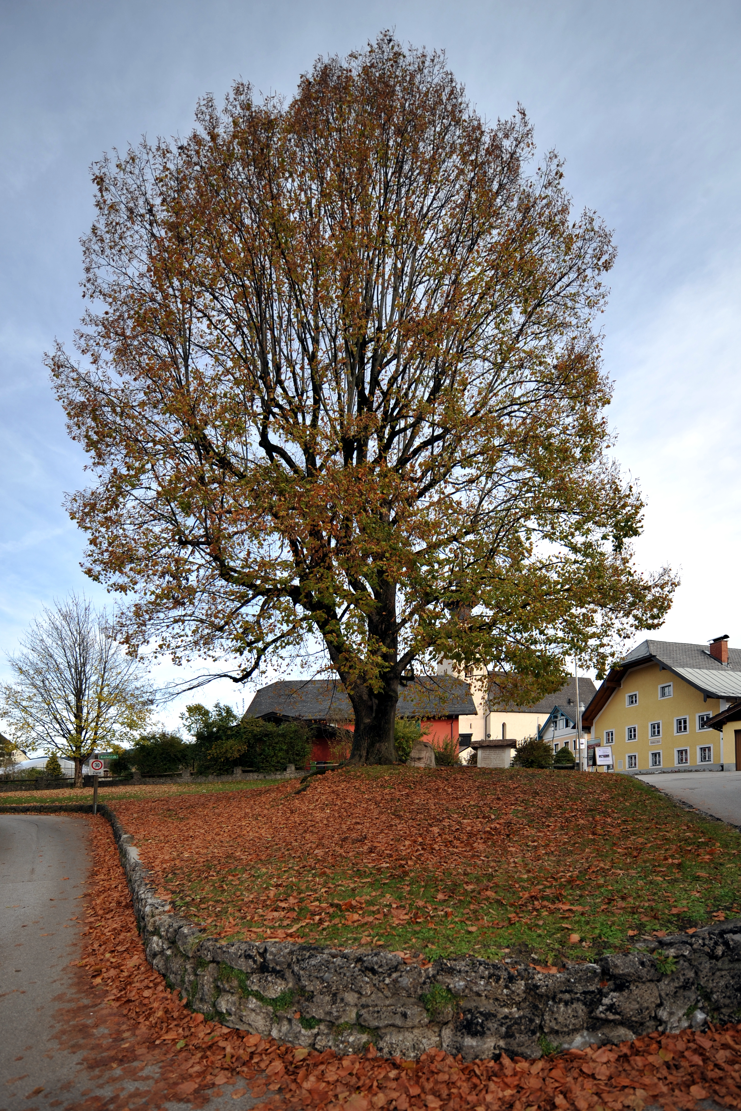 Schranne